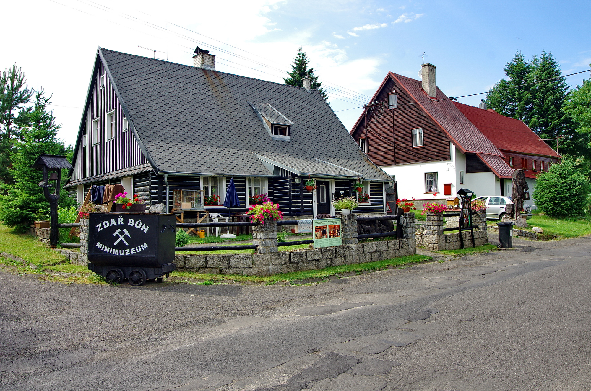 Hřebečná - mineralogické a hornické minimuzeum, část obce Abertamy, Krušné hory, okres Karlovy Vary